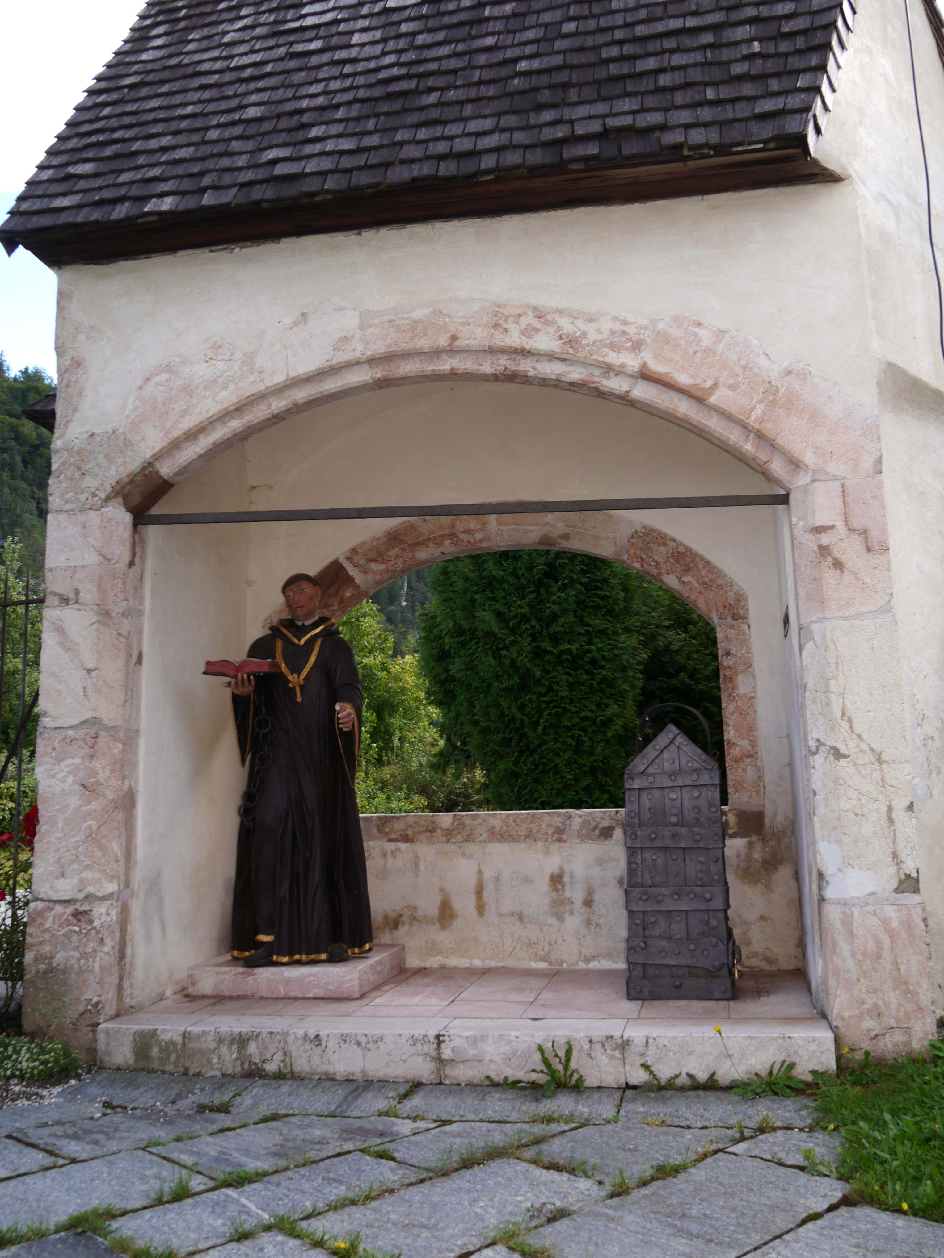 Heiltumslaube mit Figur des hl. Leonhard - Kundl Blick von Norden